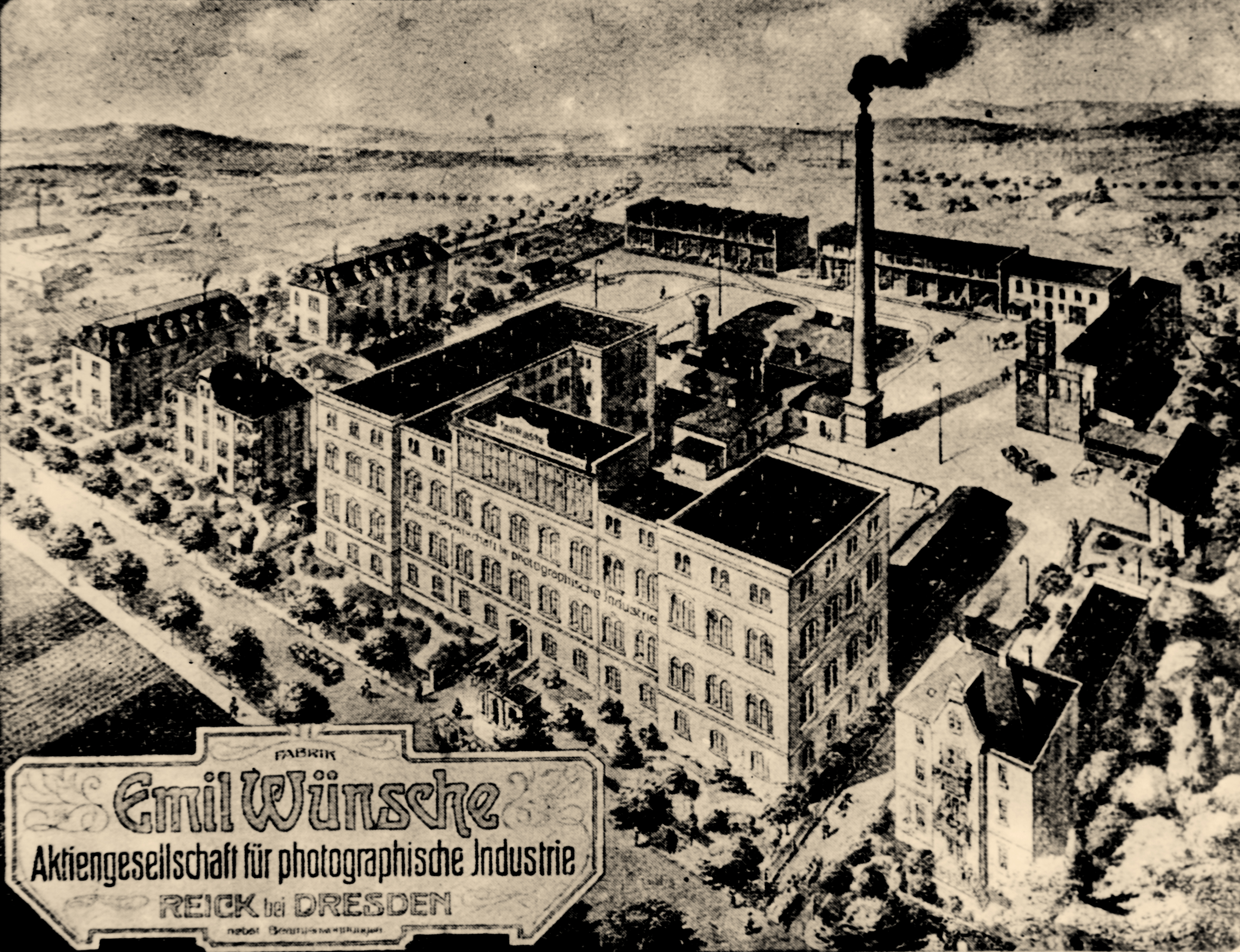 Postkarte der Emil Wünsche AG in Dresden Reick